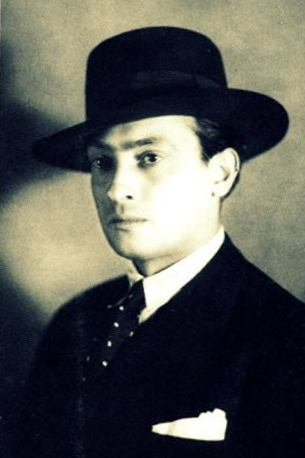 Saraví